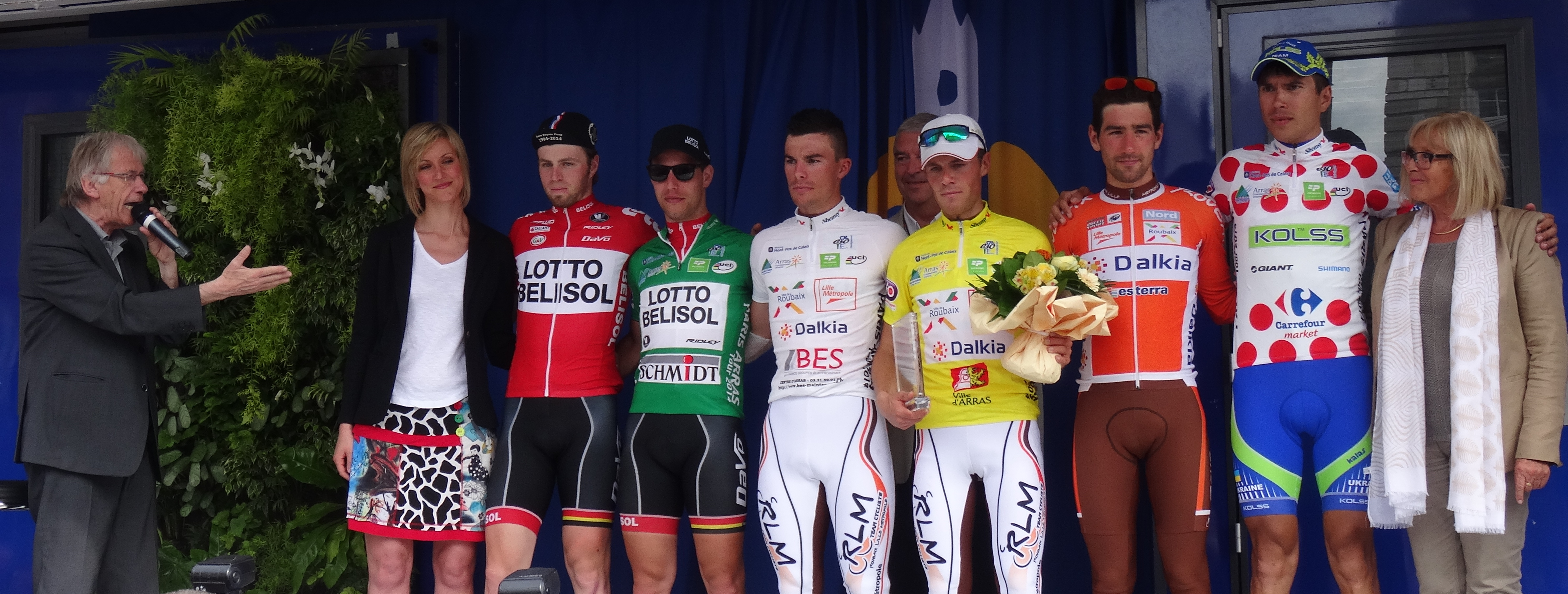 Reportage photographique réalisé le dimanche 25 mai 2014 à l'occasion du départ et de l'arrivée de la troisième étape du Paris-Arras Tour 2014 à Arras, Pas-de-Calais, Nord-Pas-de-Calais, France. Depicted people: Daniel Mangeas, Daniel McLay, Jef Van Meirhaeghe, Rudy Barbier, Maxime Vantomme, Julien Duval and Oleksandr Polivoda